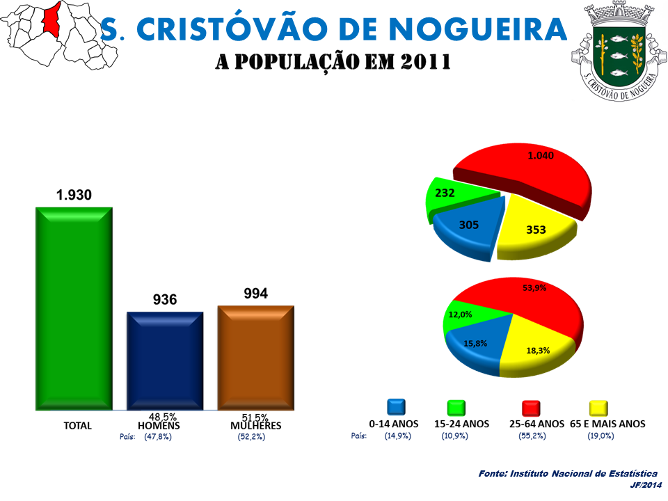 A População em 2011